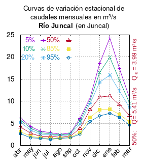 Curva de Variación Estacional Río Juncal en Juncal. # cita publicación # | apellido = Dirección General de Aguas # | nombre = # | enlace-autor = Ministerio de Obras Públicas (Chile) # | título = Diagnóstico y clasificación de los cursos y cuerpos de agua según objetivos de calidad. Cuenca del río Aconcagua # | ubicación = Santiago de Chile # | editorial = Ministerio de Obras Públicas (Chile) # | año = 2004 # | edición = # | url = # | ref = harv # Tabla 4.1: Río Juncal en Juncal (m 3 /s) , pág 48 mes 5% 10% 20% 50% 85% 95% abr 6.270 5.769 5.185 4.174 3.122 2.598 may 4.243 3.866 3.451 2.770 2.097 1.773 jun 3.275 2.909 2.552 2.064 1.699 1.562 jul 2.860 2.659 2.427 2.023 1.591 1.370 ago 2.579 2.359 2.144 1.854 1.639 1.560 sep 2.795 2.604 2.405 2.103 1.836 1.714 oct 6.118 5.479 4.812 3.805 2.910 2.504 nov 10.718 10.128 9.413 8.047 6.364 5.375 dic 18.581 16.480 14.290 10.982 8.043 6.709 ene 24.279 19.900 15.945 11.167 8.187 7.245 feb 17.418 14.784 12.319 9.178 7.054 6.329 mar 10.664 9.591 8.471 6.781 5.279 4.598